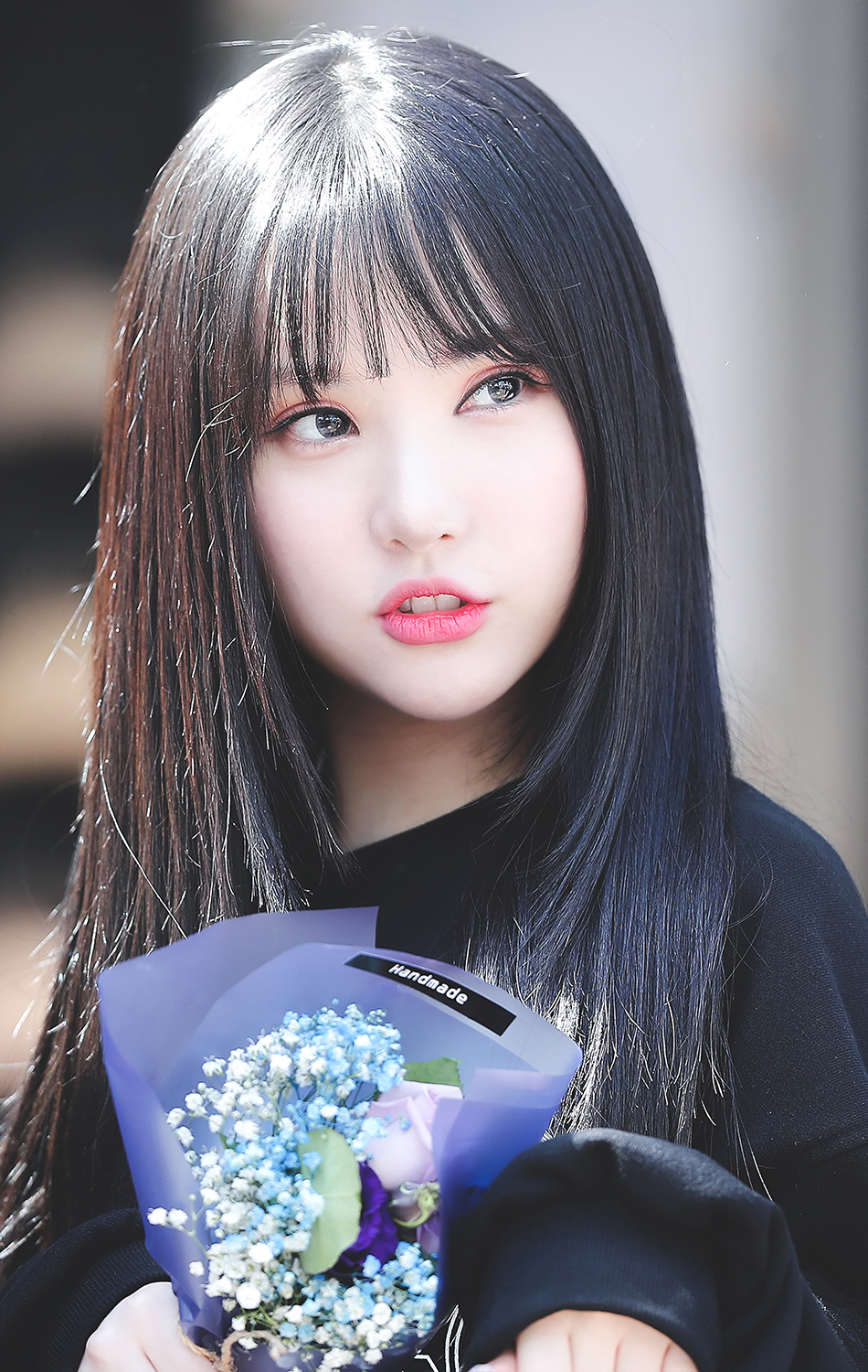 180428 리복 팬싸인회